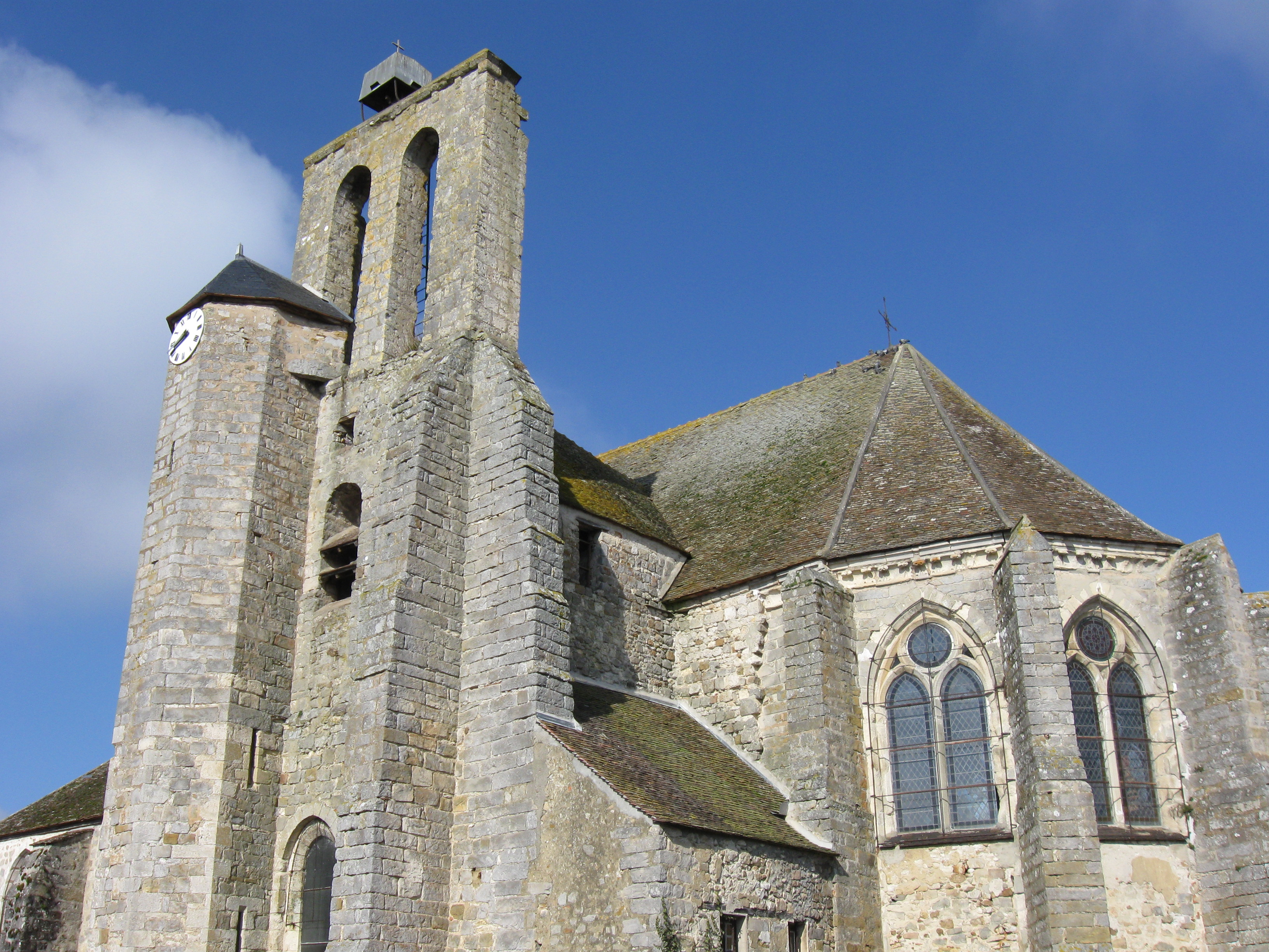 Église Notre-Dame-de-l'Assomption de Flagy. (Seine-et-Marne, région Île-de-France).